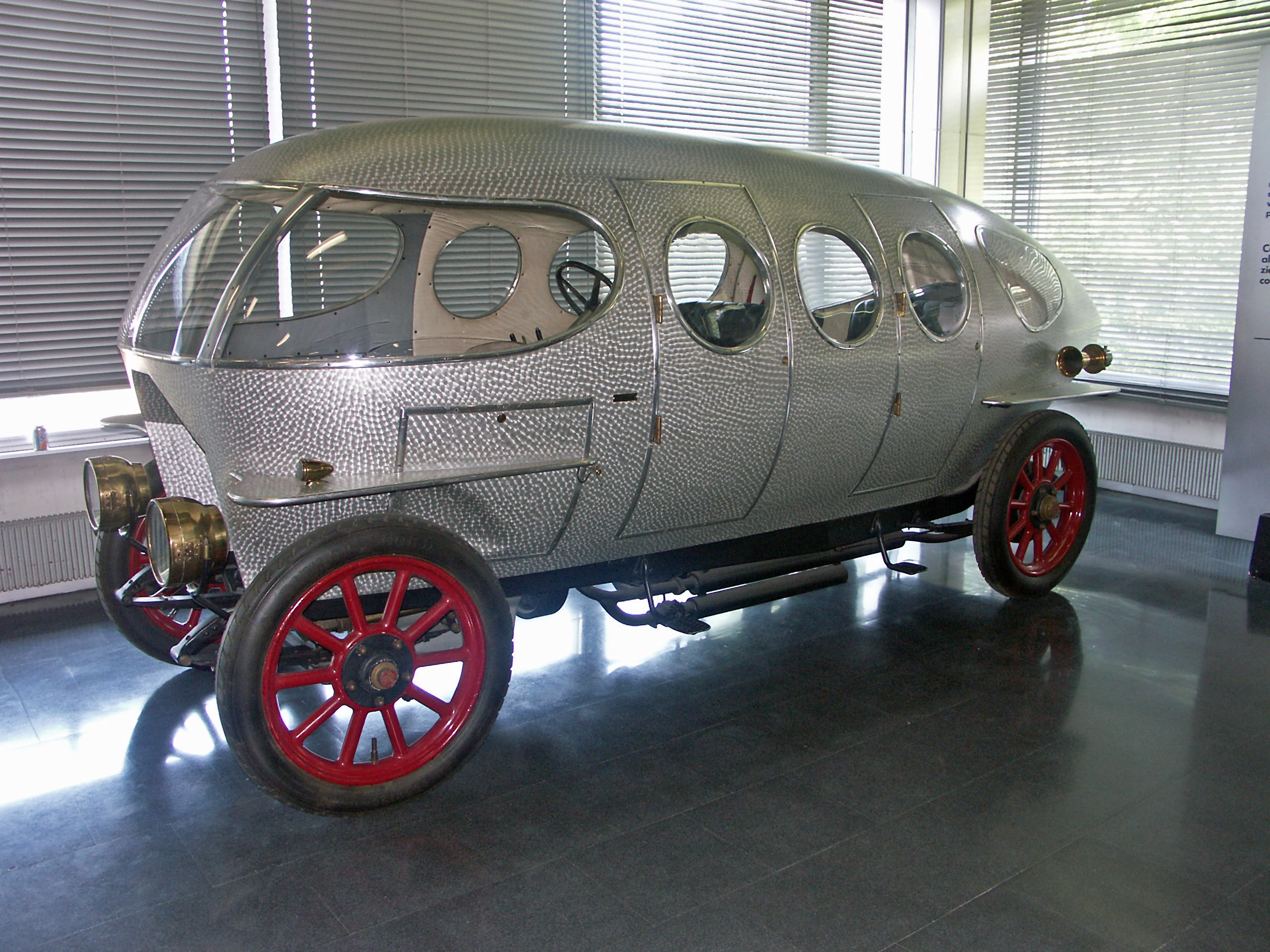 ALFA 40/60 Hp Castagna Aerodinamica del 1913, prima monovolumenella storia dell'automobile